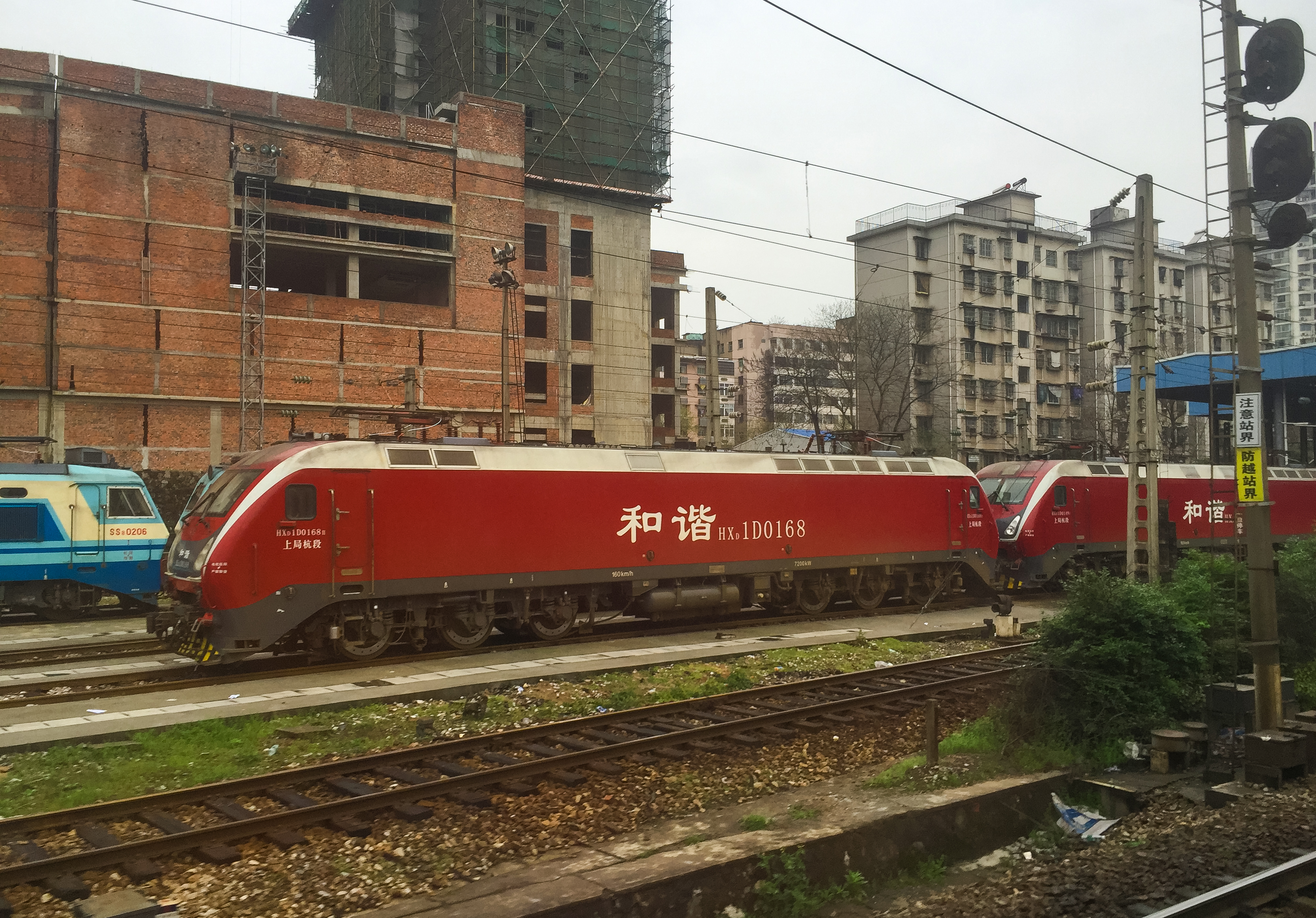 上局杭段HXD1D-0168在株洲机务折返段